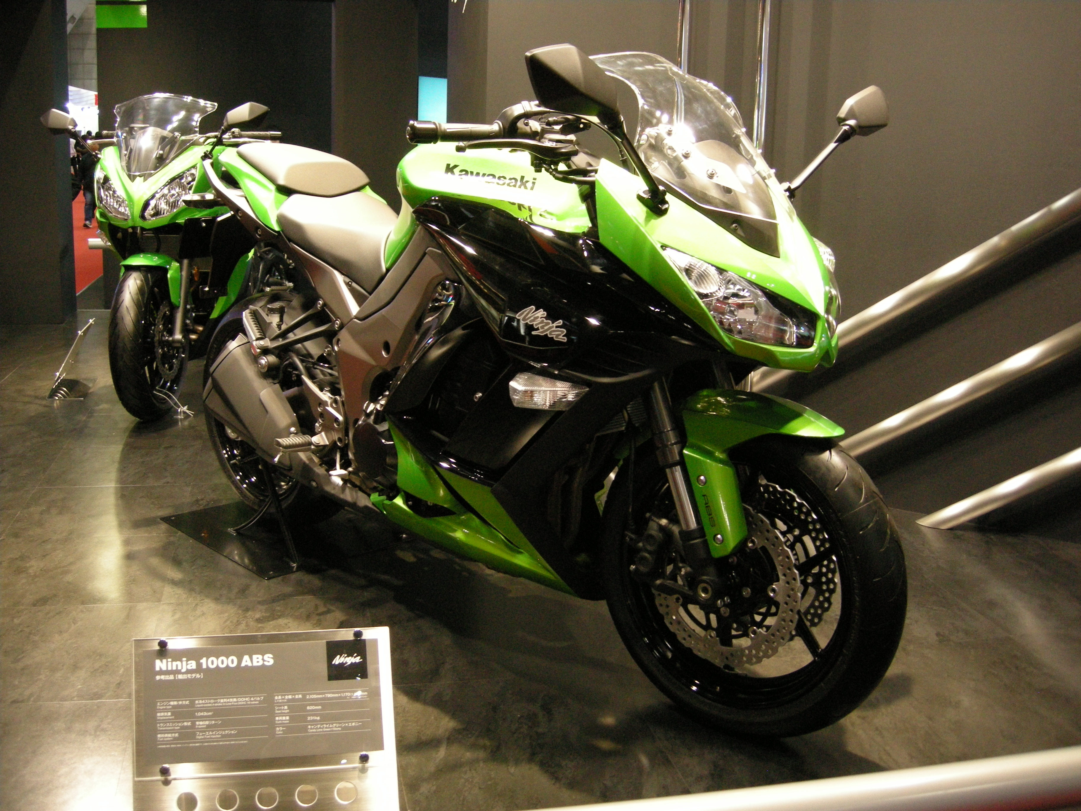 2011年東京モーターショーにて撮影